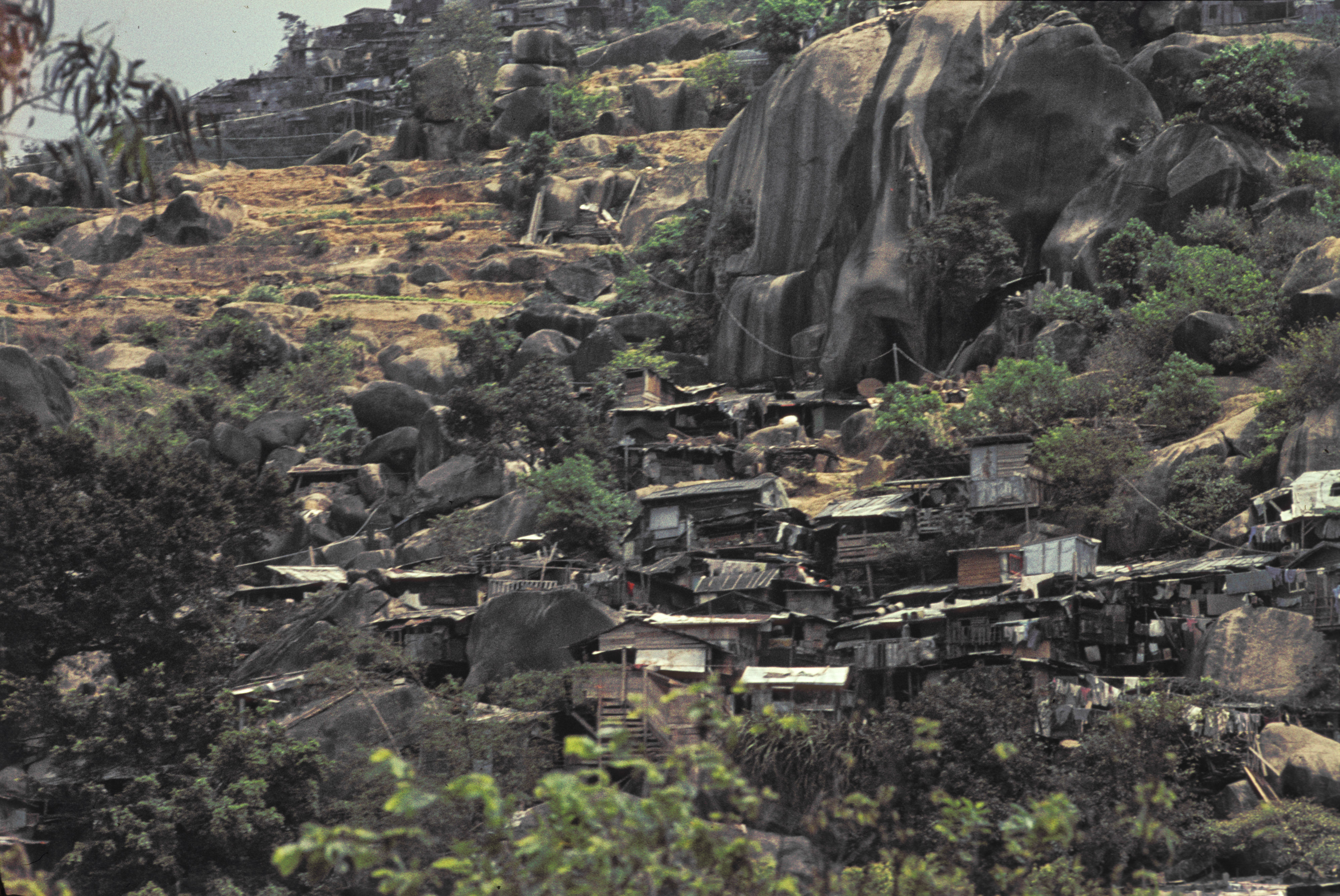 Hong Kong